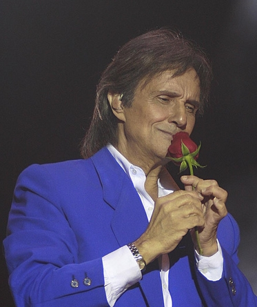 Roberto Carlos, cantor brasileiro, em abril de 2009.